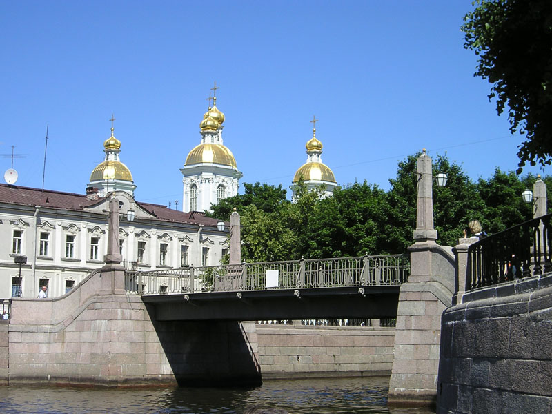 Krasnogvardeysky ('Red Guard') bridge in Saint-Petersburg